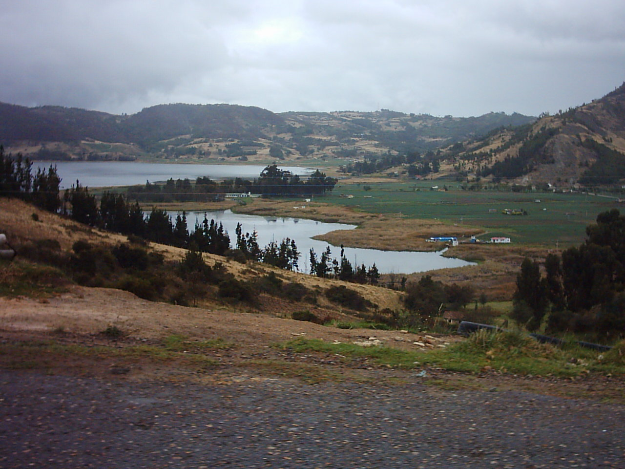 Paisaje vecino Laguna de Tota, Colombia